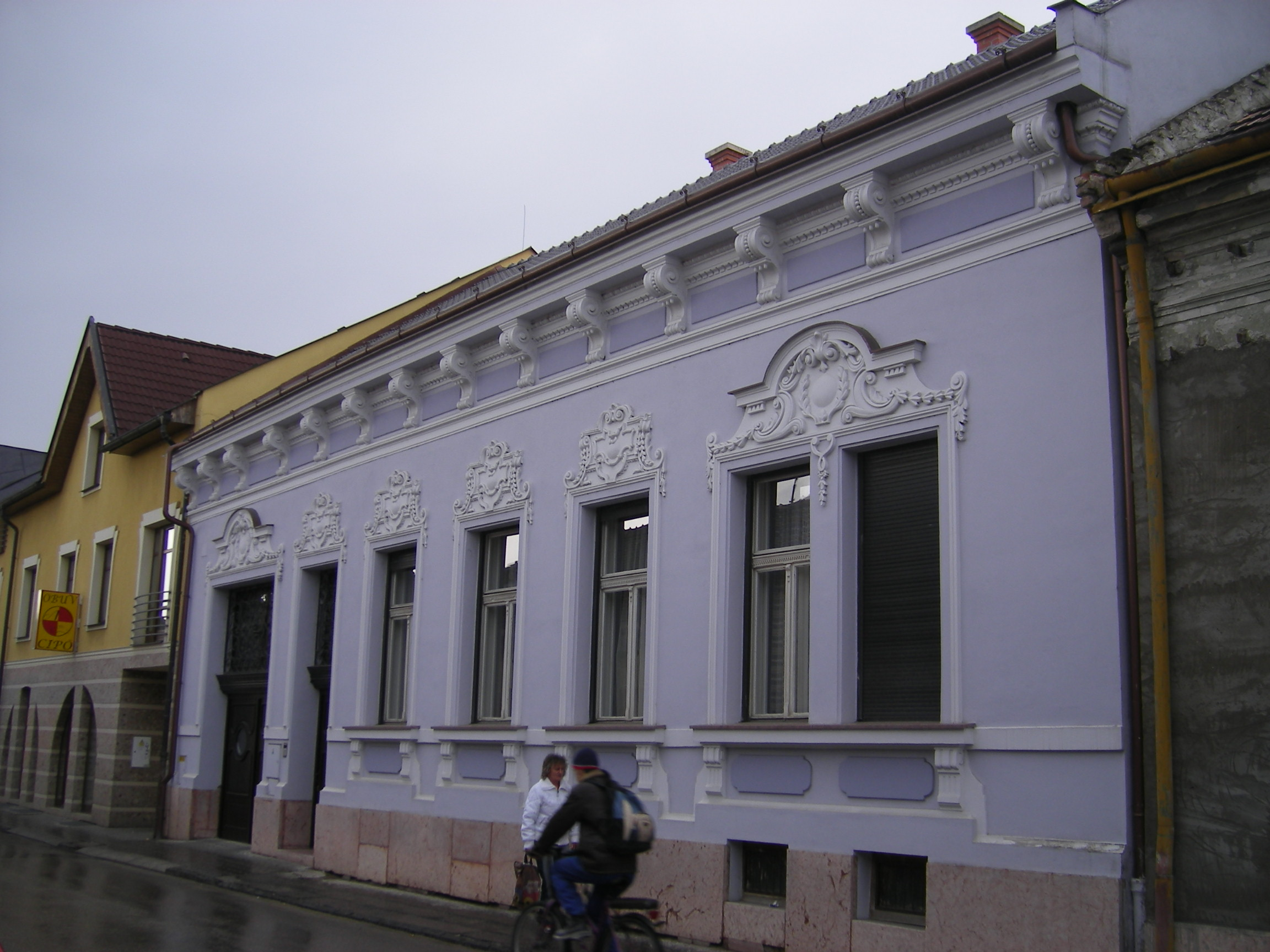 Komárom - Thaly Kálmán utca